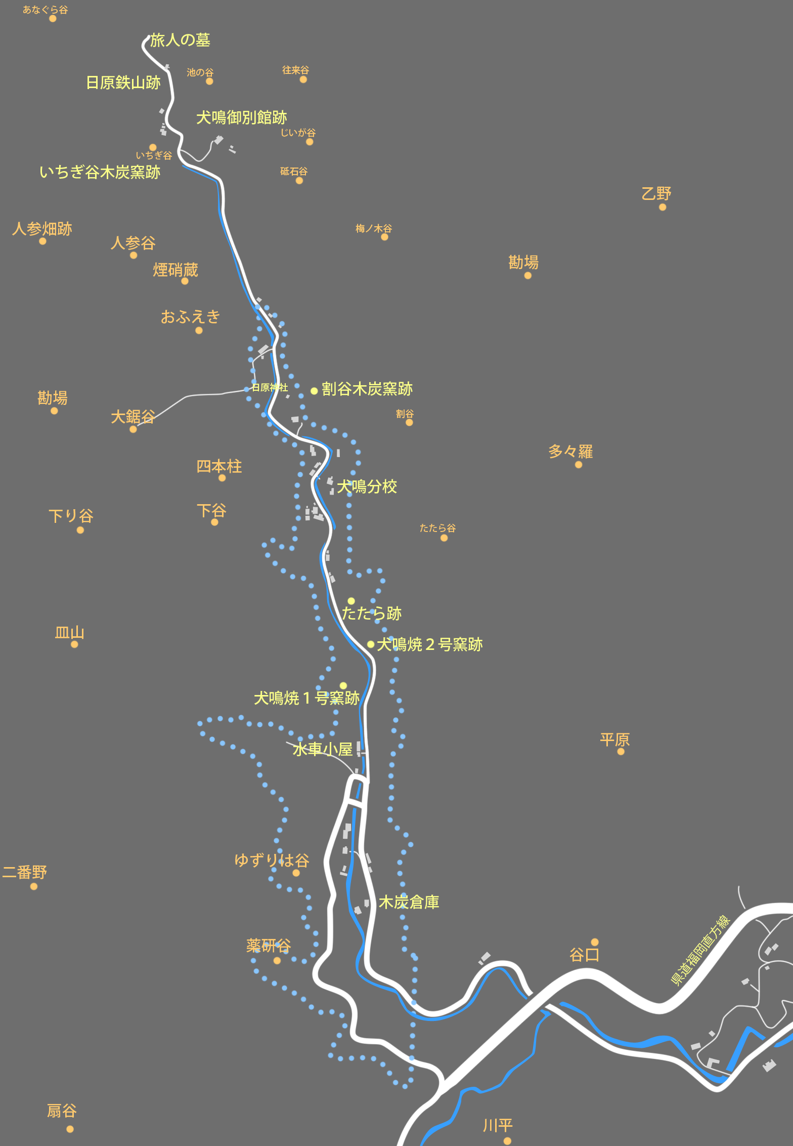 1960年代の犬鳴村の簡易地図。水色の点線はダムによる水没範囲である。犬鳴村の旧道は、現在犬鳴ダム管理出張所で行き止まりである。